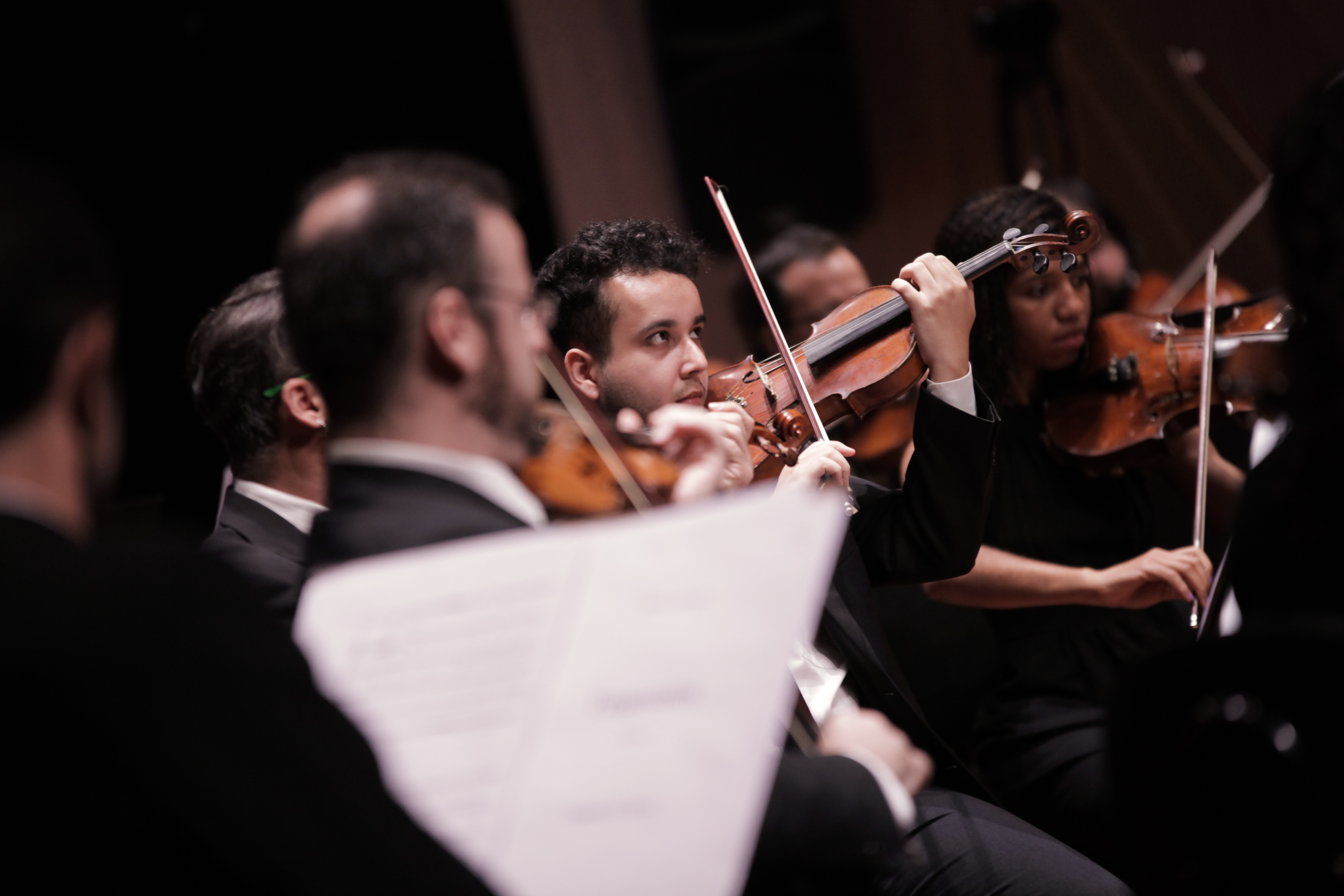 Orquestra Sinfônica Nacional. Regente Simone Menezes. Pe'ca Tetrammaton XV b, de Roberto Victorio. Foto: Janine Moraes/MinC